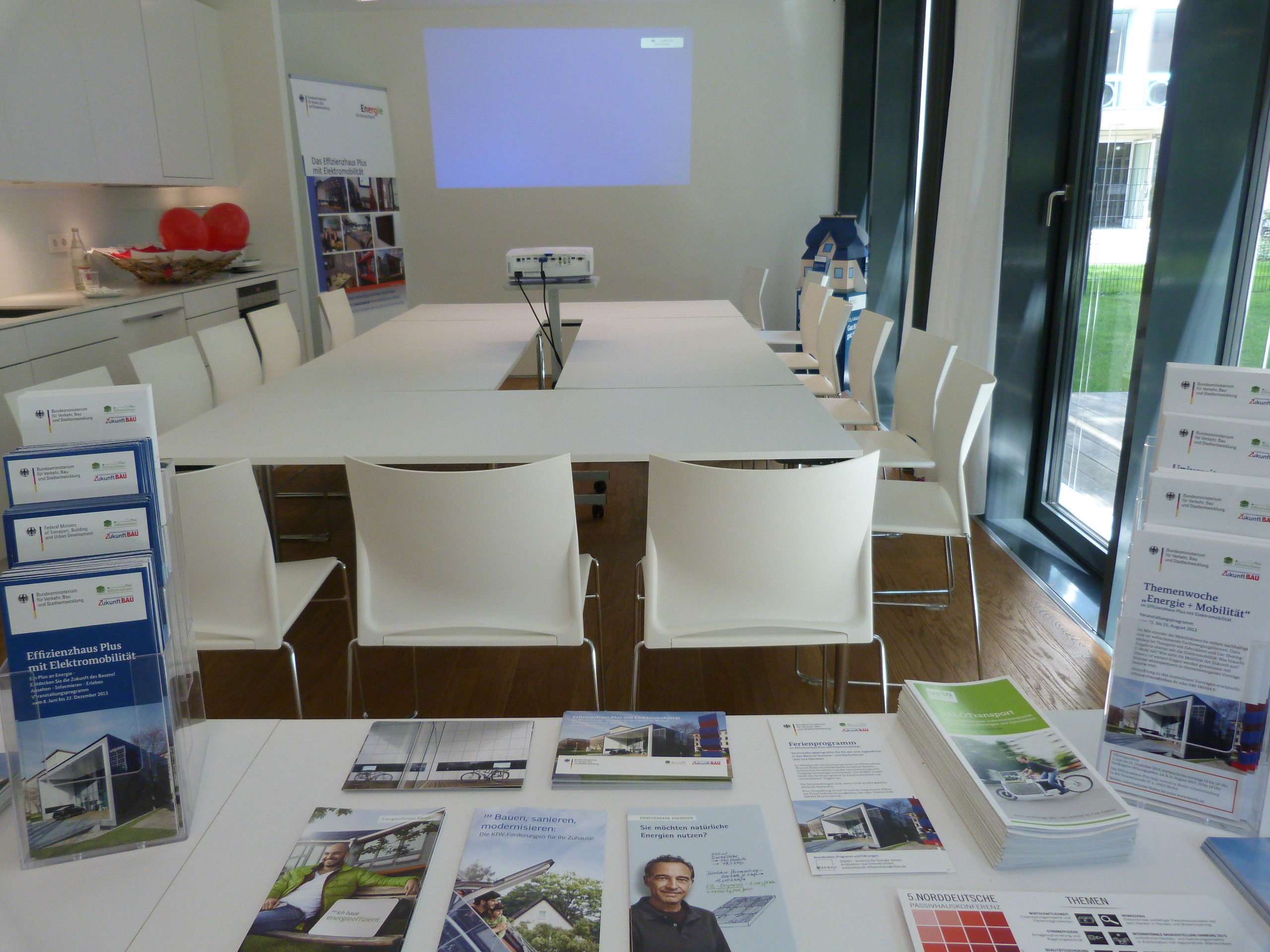 Konferenzsituation im EG des Effizienzhaus Plus mit Elektromobilität